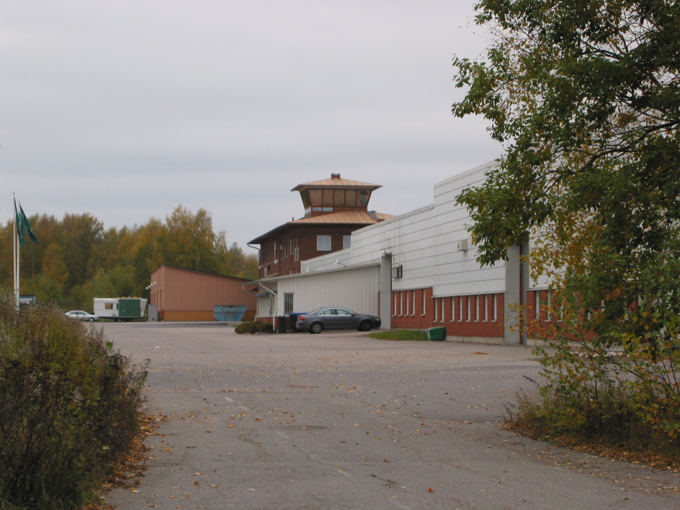 Brandholmen